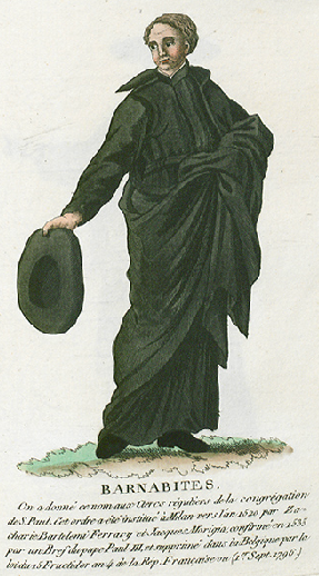 Collection de costumes de tous les ordres monastiques, supprimés à differentes époques, dans la ci-devant Belgique, Bruxelles, Philippe Joseph Maillart et sœur, 1811